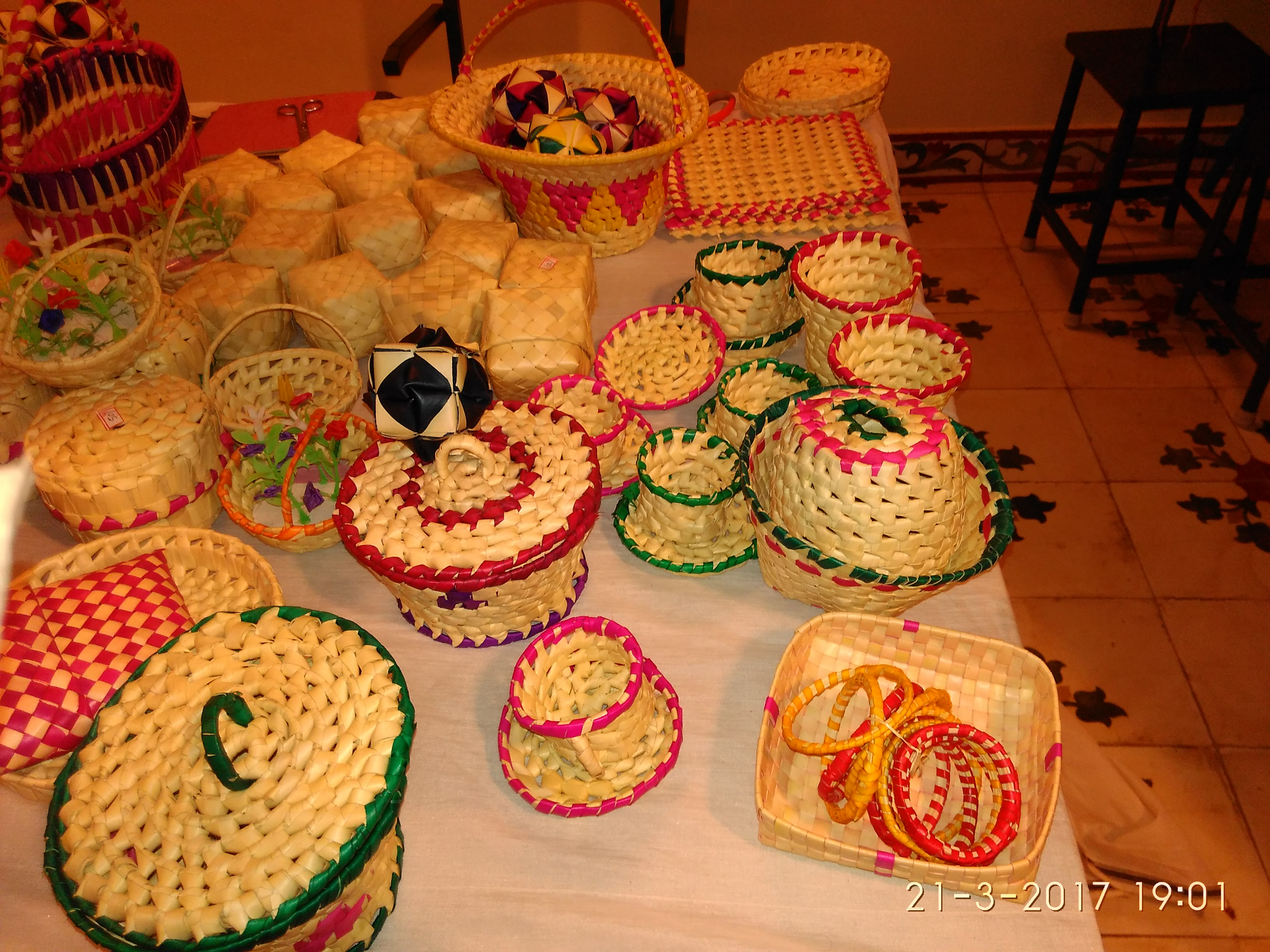 பனையோலை அலங்காரப் பொருட்கள்